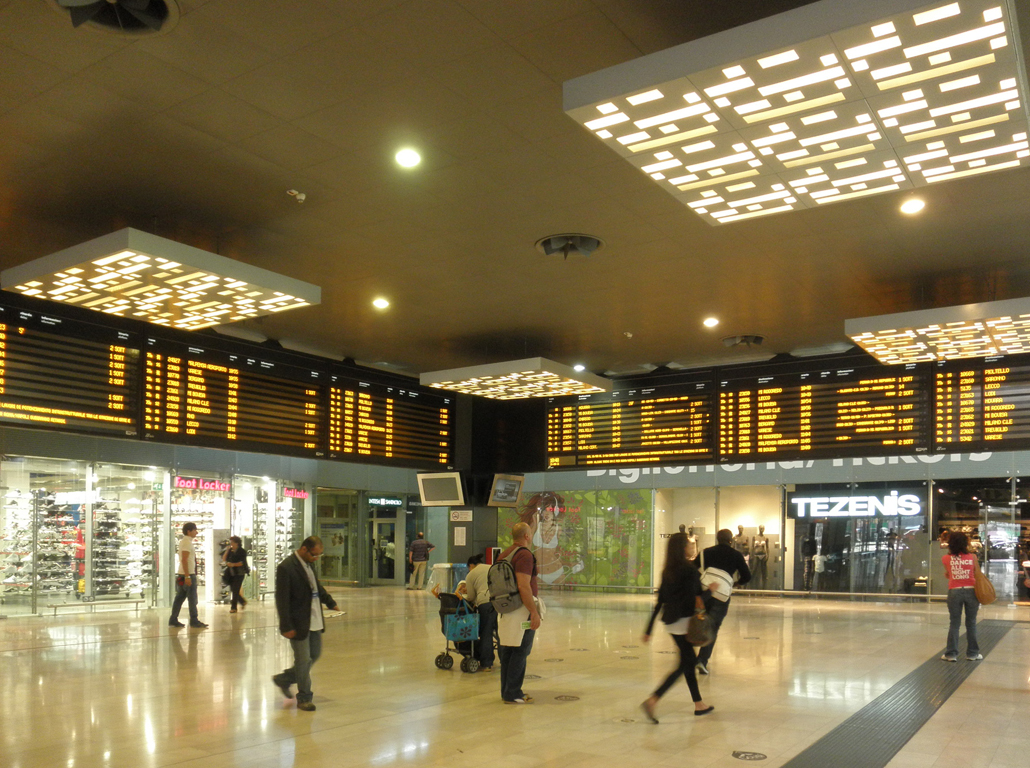 Tabelloni indicatori alla stazione di Milano Porta Garibaldi